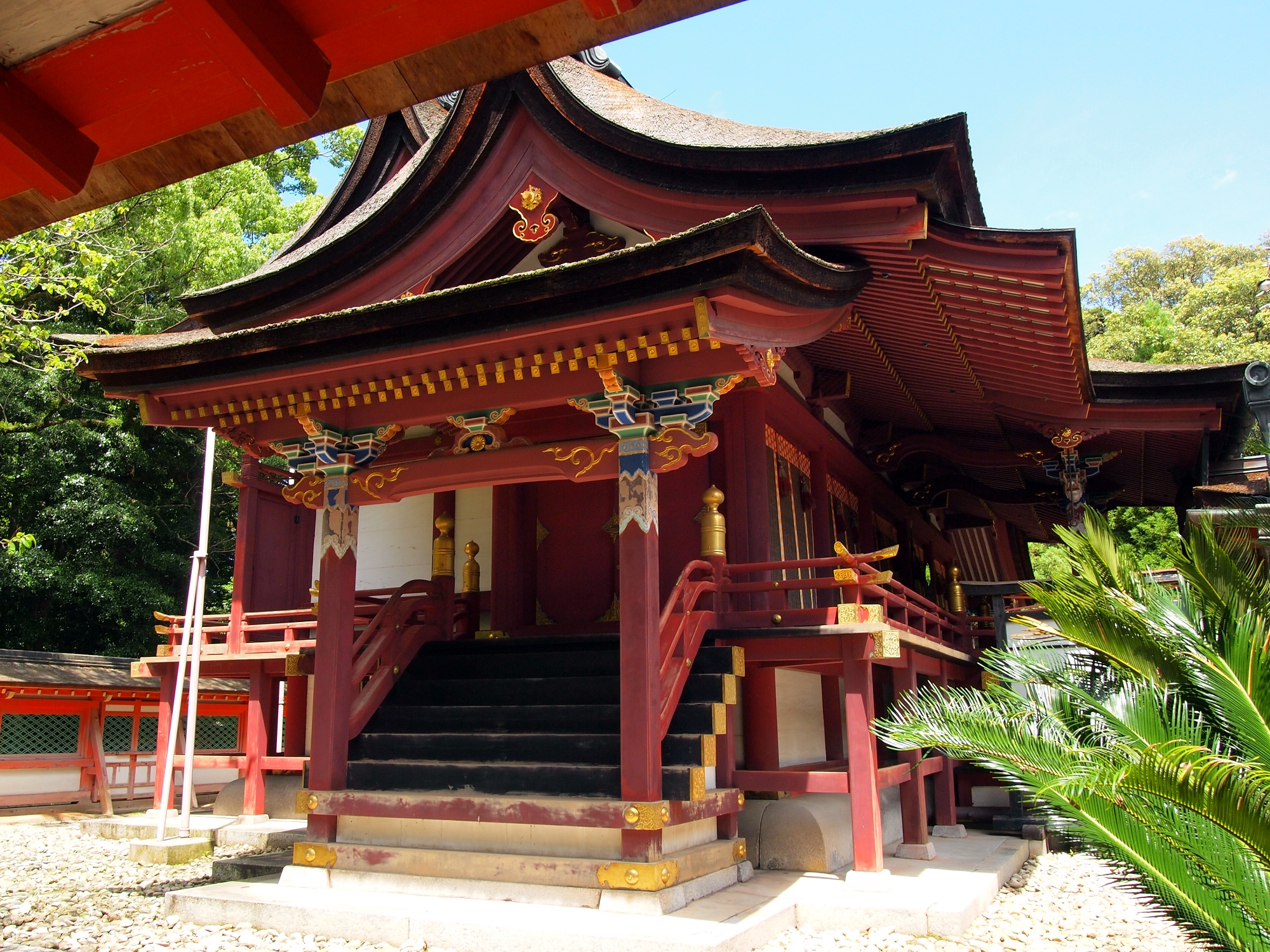 福岡市東区 香椎宮の本殿